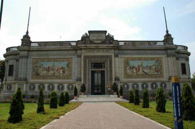 Vista del Museo de Arte Italiano en Lima, Perú